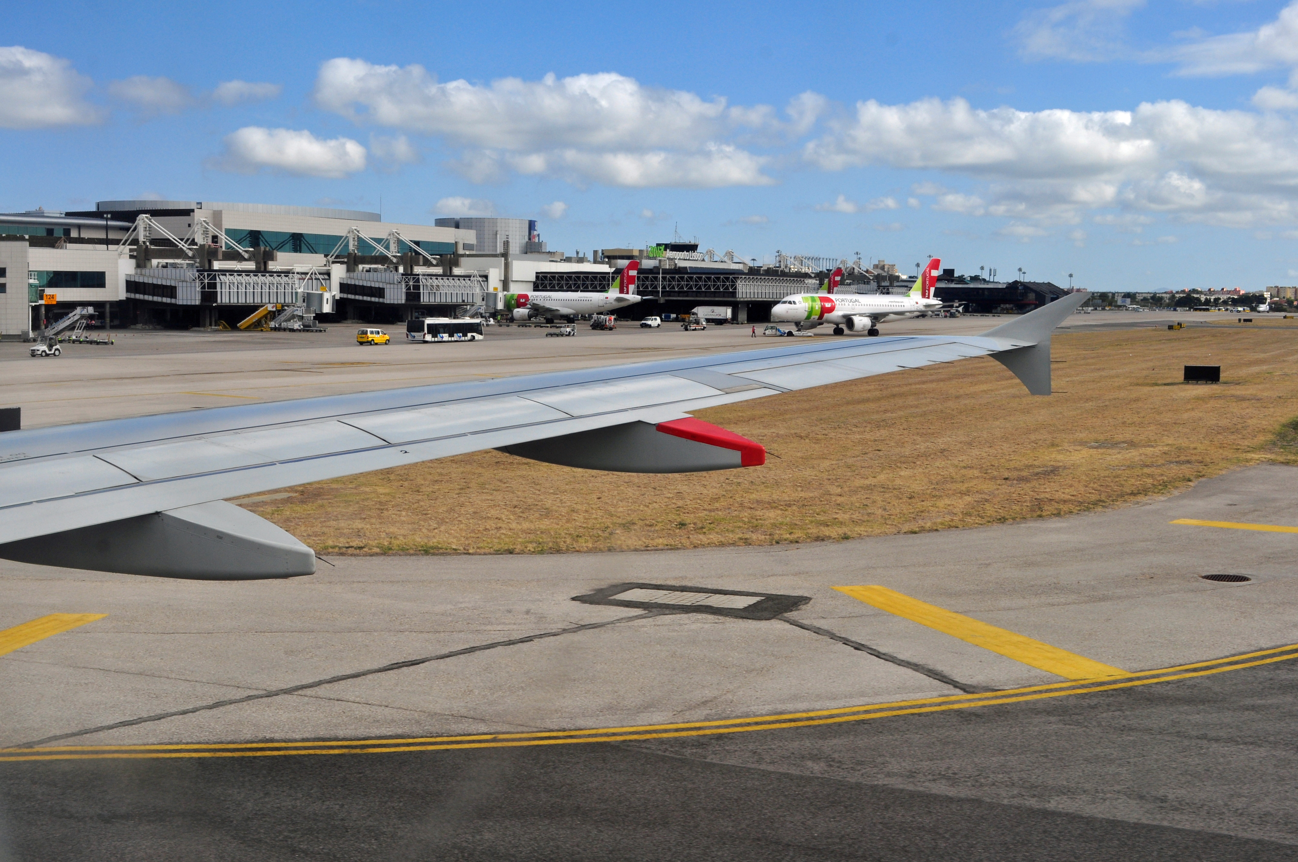 Lissabon, Flughafen Lissabon-Portela (2012-09-22), by Klugschnacker in Wikipedia (1)